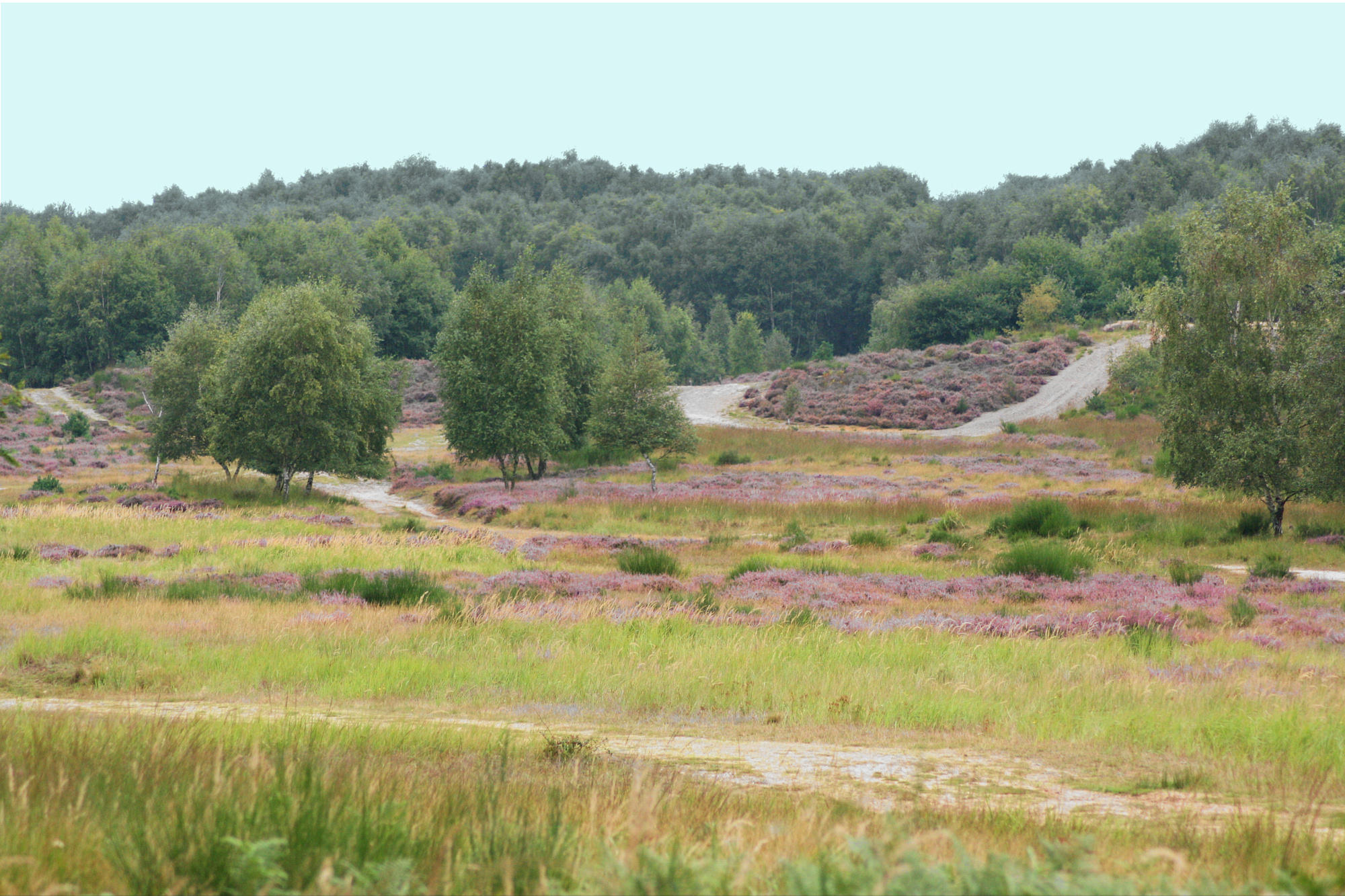 Wahner Heide, Heideblüte